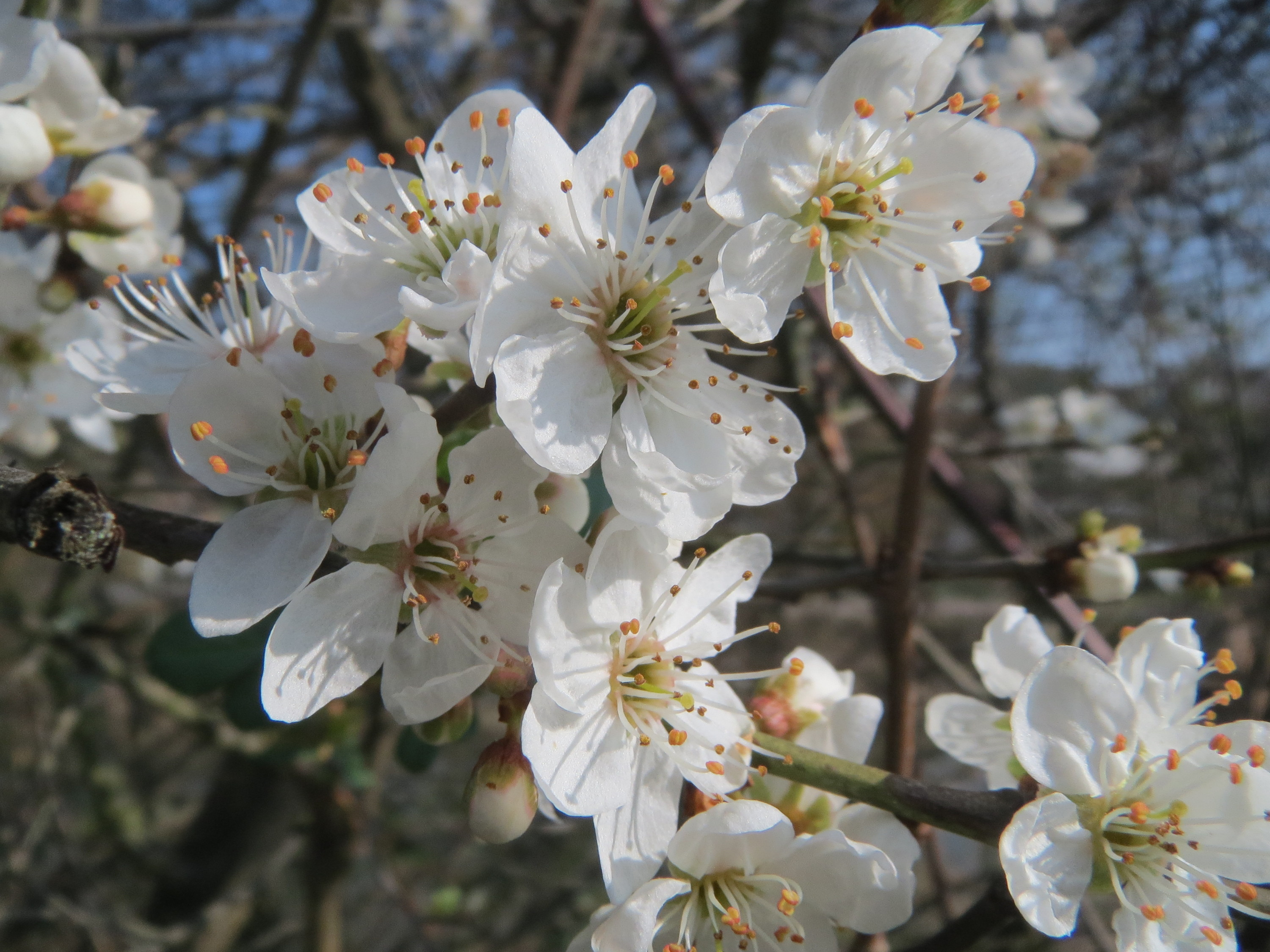 Kirschpflaume (Prunus cerasifera) im Ebertpark Hockenheim